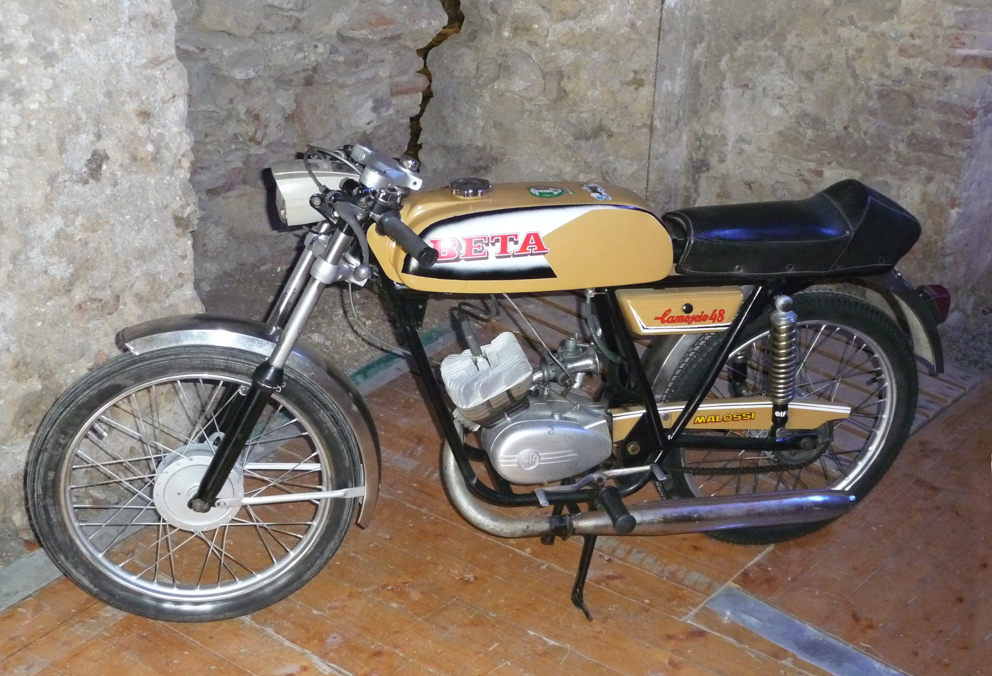 Motocycle Beta Camoscio 48